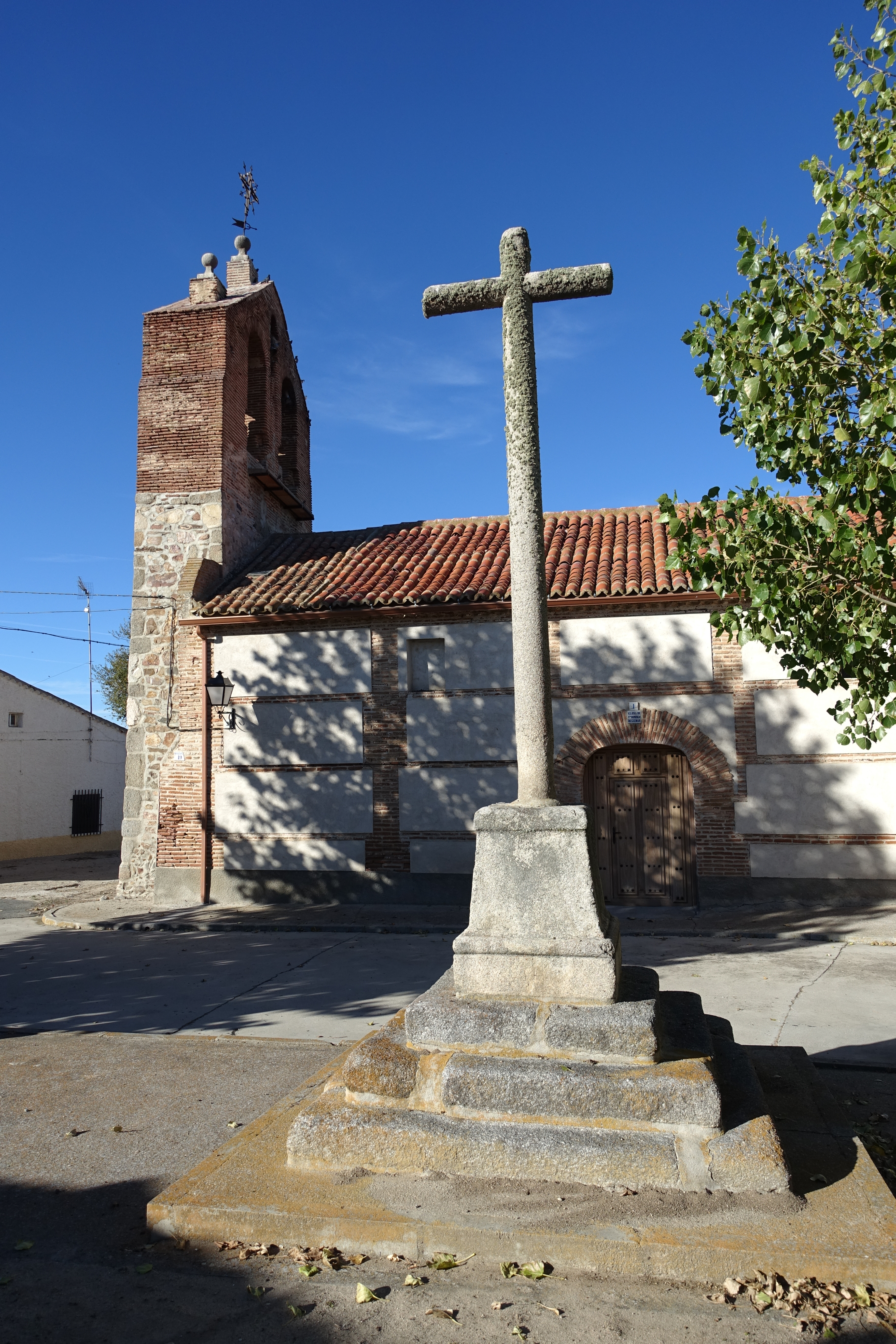 Iglesia de Santo Domingo de Guzmán, en Viñegra de Moraña (Ávila, España).